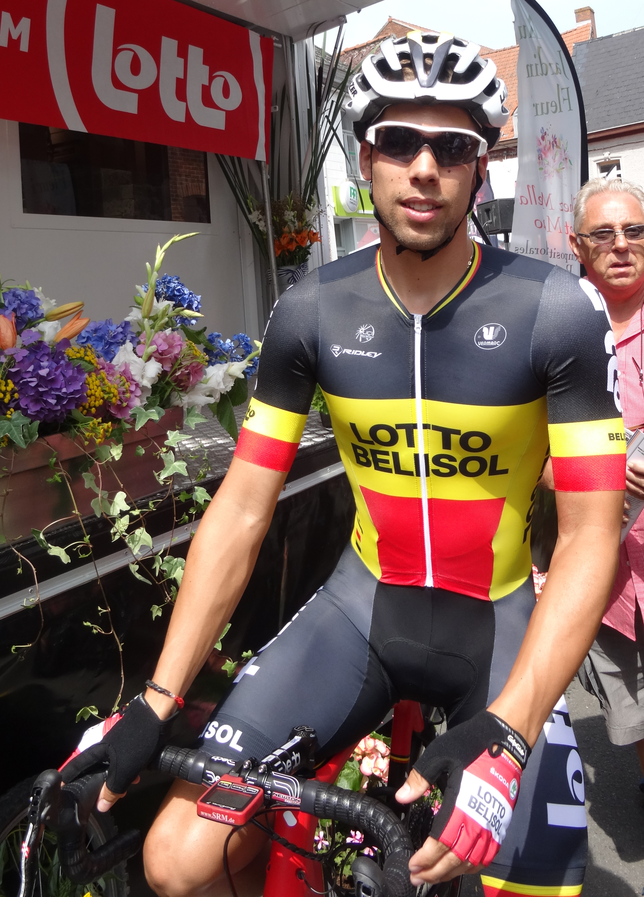 Reportage photographique réalisé le samedi 26 juillet à l'occasion du départ de la première étape du Tour de Wallonie 2014 à Frasnes-lez-Anvaing, Belgique.